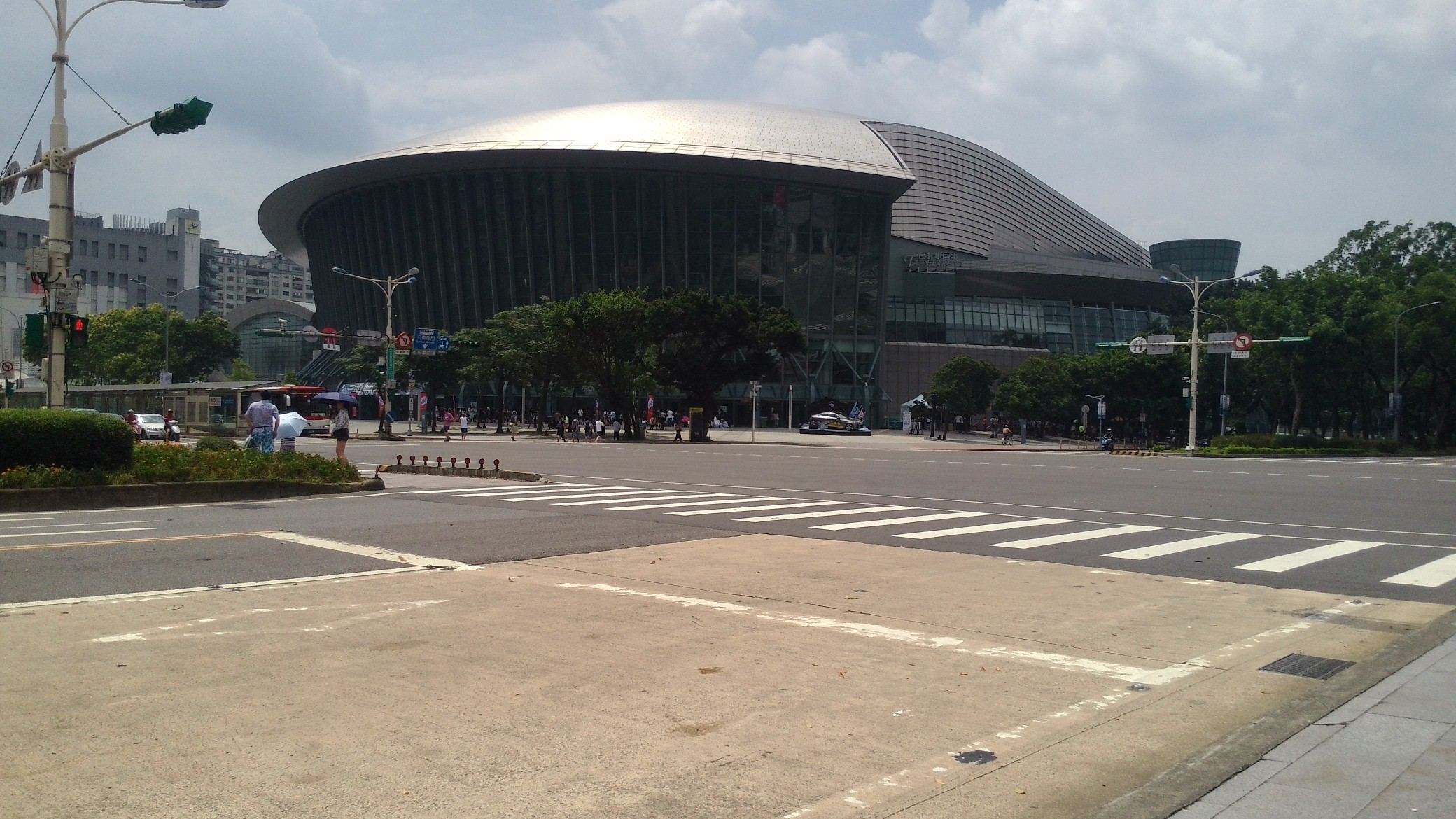 臺北小巨蛋。